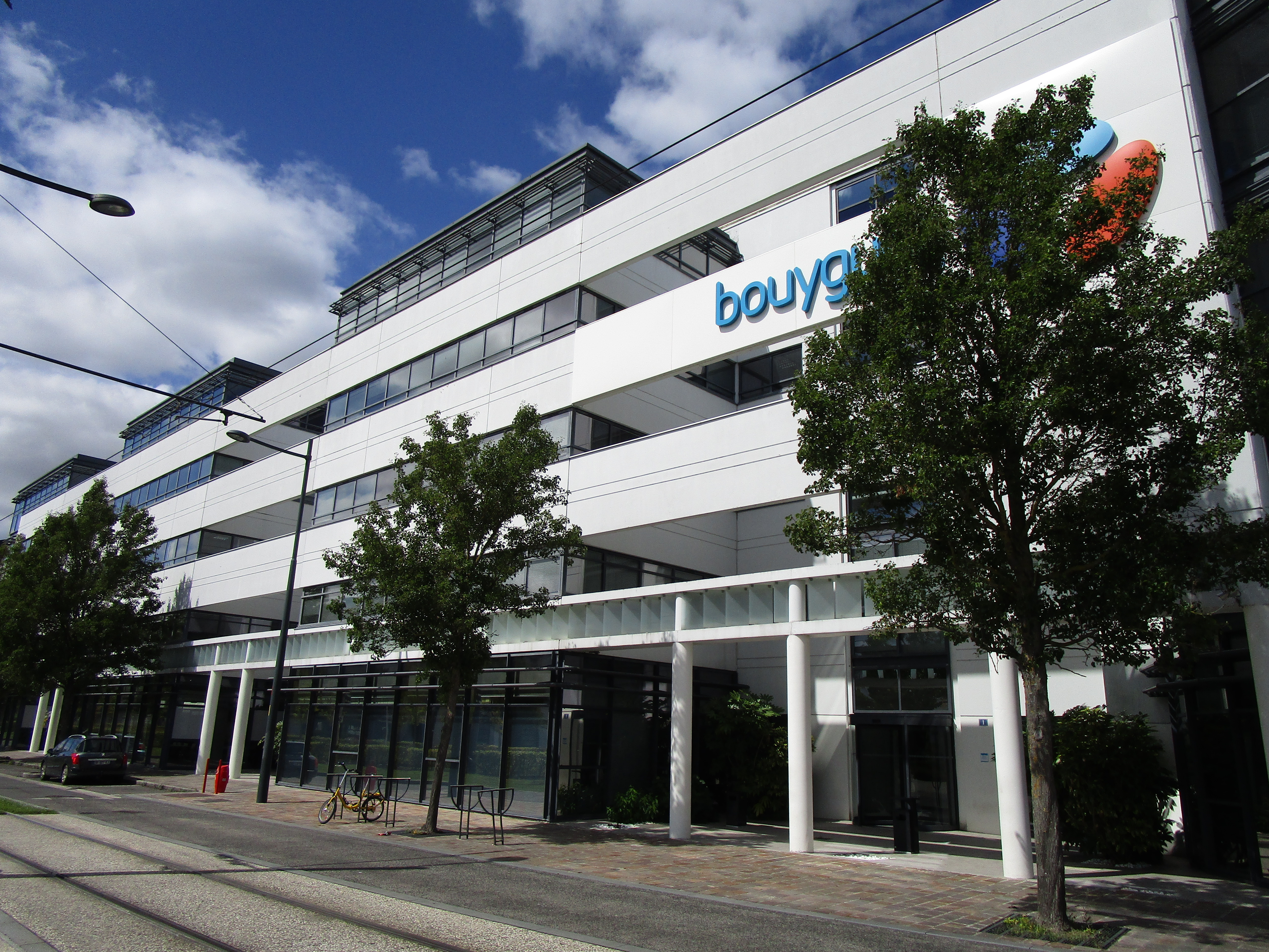 Locaux de Bouygues Telecom dans le quartier des Deux-Lions, à Tours, construits en 2000.